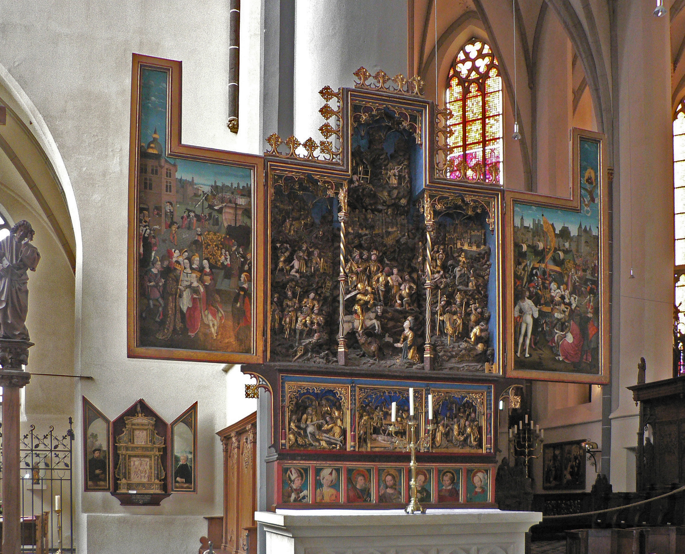 Gesamtansicht des Georgaltars in St. Nikolai, Kalkar